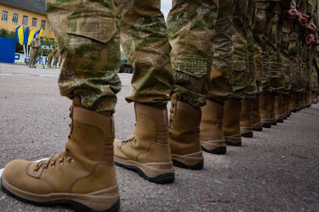 Робоча поїздка до Житомирської області